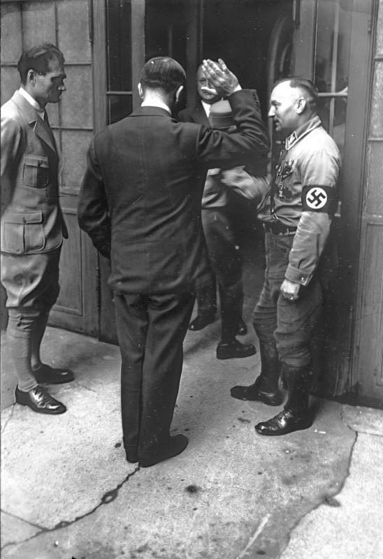 Berühmte Persönlichkeiten von hinten gesehen ! Es ist nicht immer Notwendig berühmte Persönlichkeiten nur von vorn zu fotografieren, auch von hinten aufgenommen wirkt sie sehr interessant. Typisch und leicht Erkennbar von hinten, ist der Führer der Nationalsozialisten Adolf Hitler.